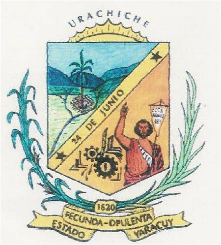 Escudo del Municipio Autónomo Urachiche del estado Yaracuy (Venezuela)